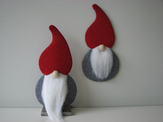 Patchwork kan også syes i hånden over pap skabeloner som bliver i disse nisser, så de kan holde faconen.